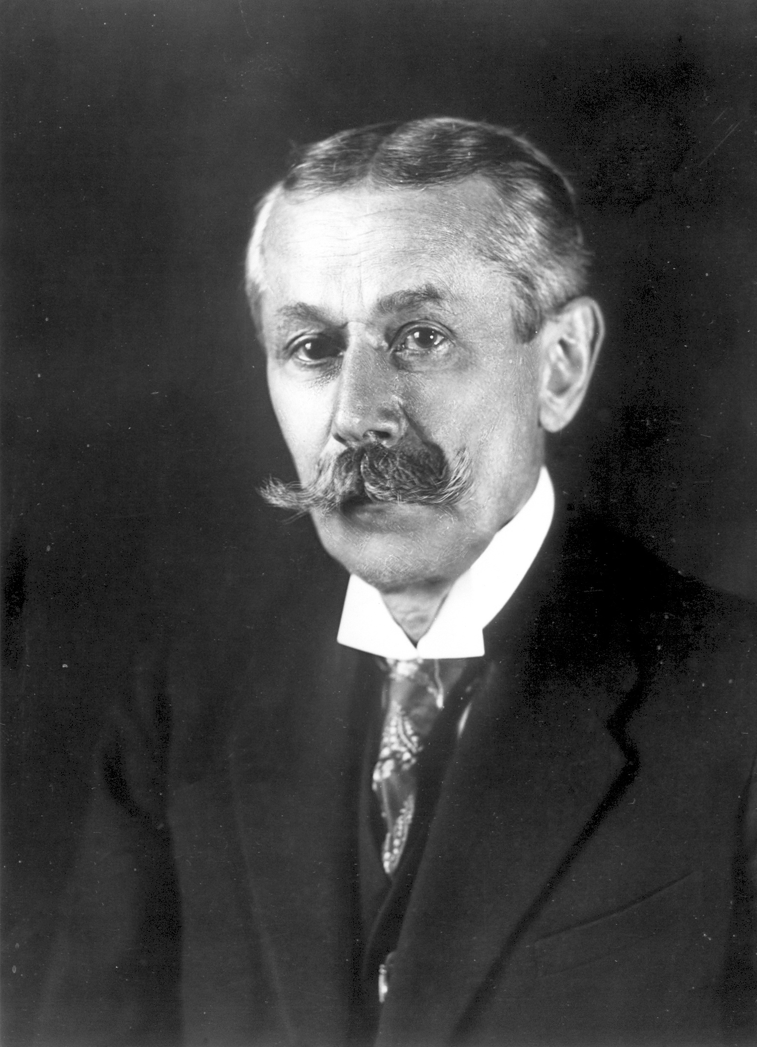 Václav Dragoun, 1928 (Česká pošta s.p,, Poštovní muzeum)